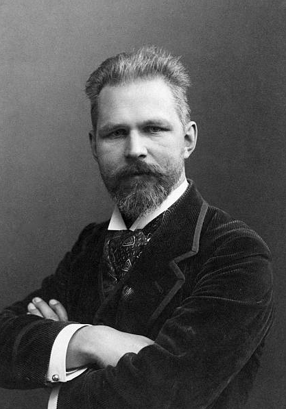 Portrait des Malers Georg Ludwig Meyn, 1900